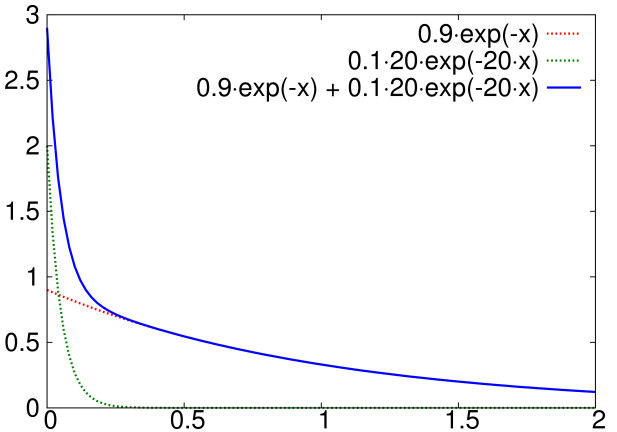 The blue solid curve shows the probability density function of a hyperexponential distribution p1*L1*exp(-L1*x)+p2*L2*exp(-L2*x) with p1=0.9, p2=0.1, L1=1 and L2=20. The red dashed curve shows the part p1*L1*exp(-L1*x) and the green curve shows the part p2*L2*exp(-L2*x).